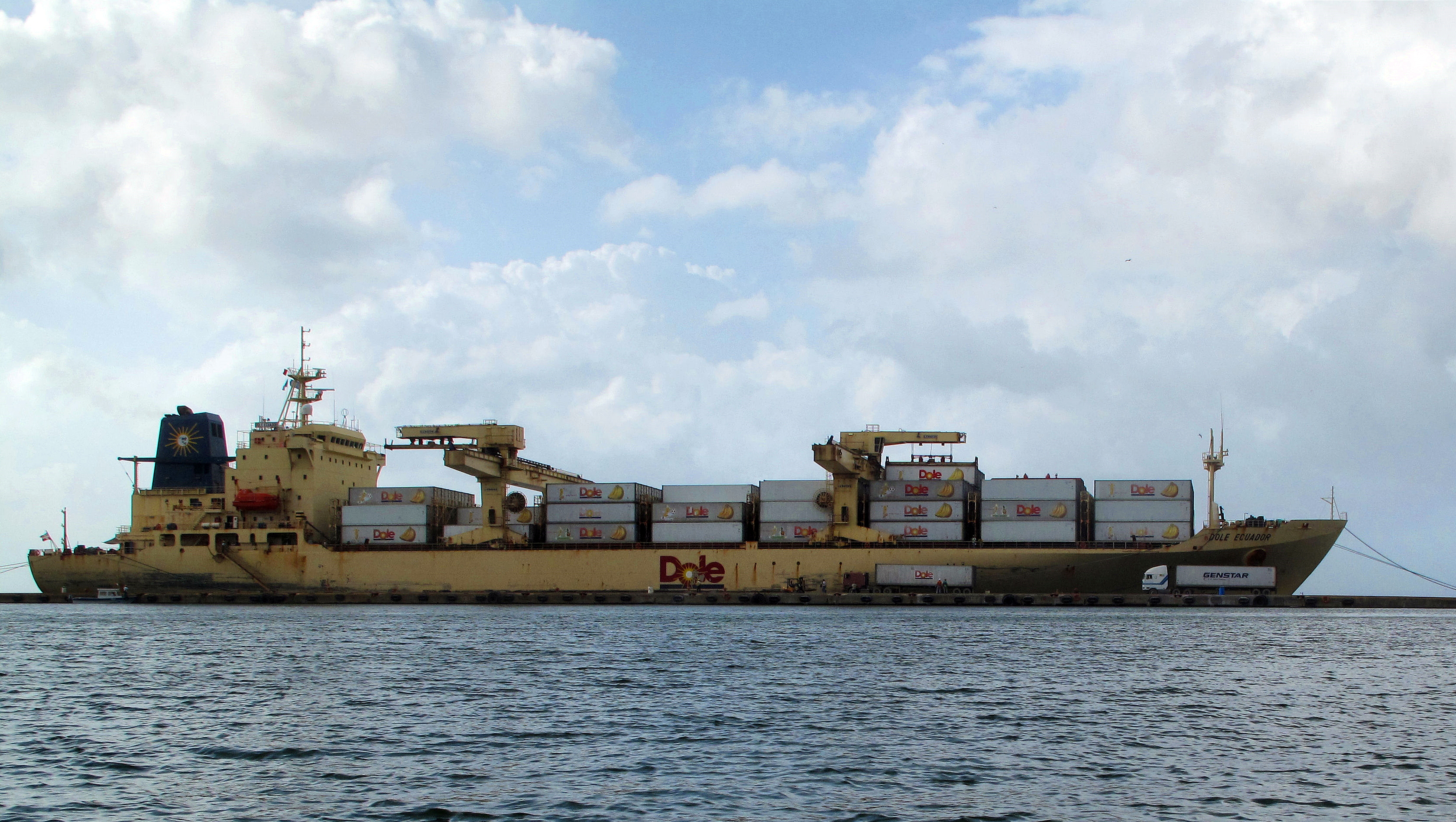 Banana Boat (Dole Ecuador) in Puerto Barrios, Guatemala.